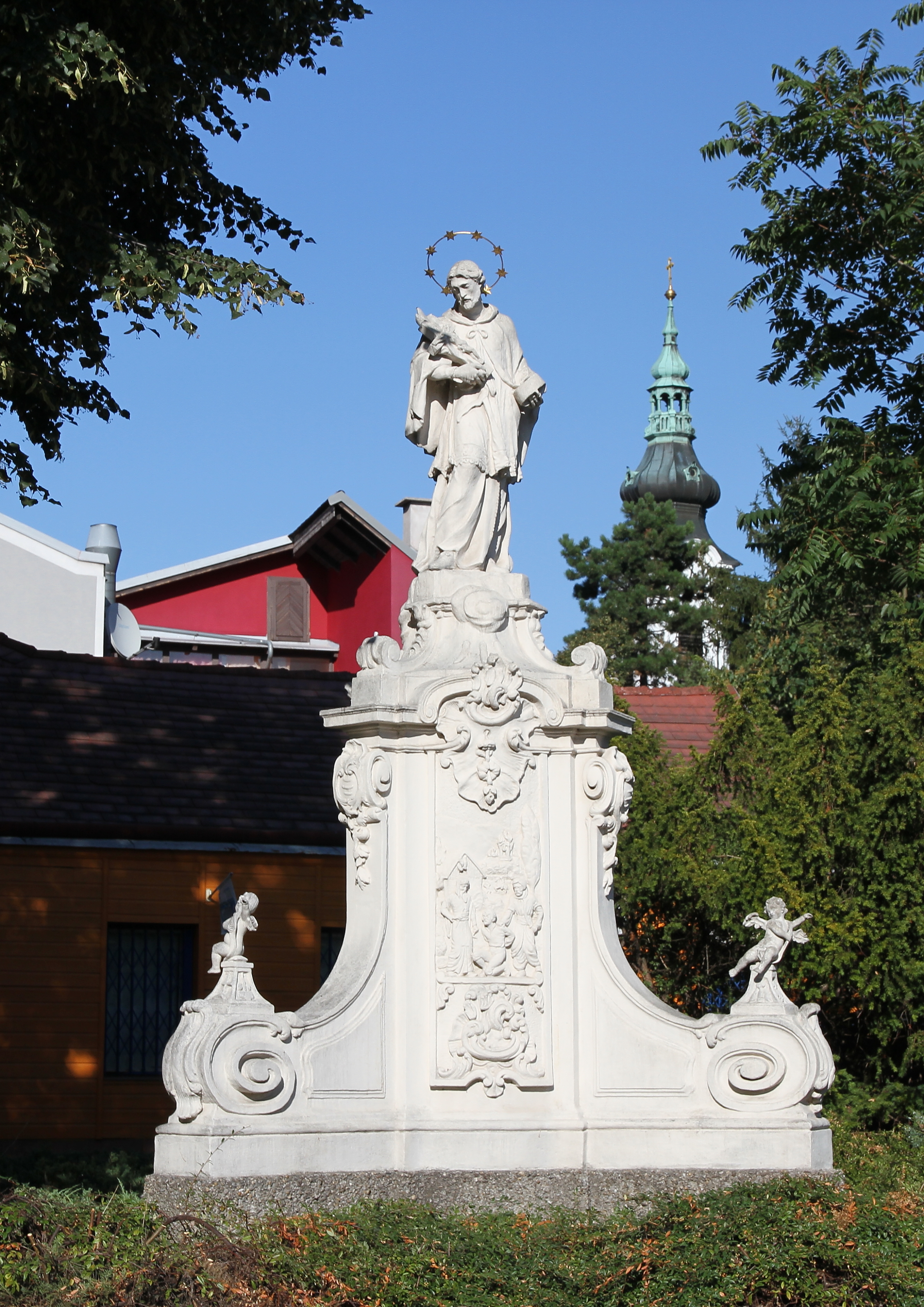 Die Nepomuk-Statue an der Wiener Straße in der niederösterreichischen Marktgemeinde Langenzersdorf. Ein Werk von Stefan Gabriel Steinböck aus dem Jahr 1766.